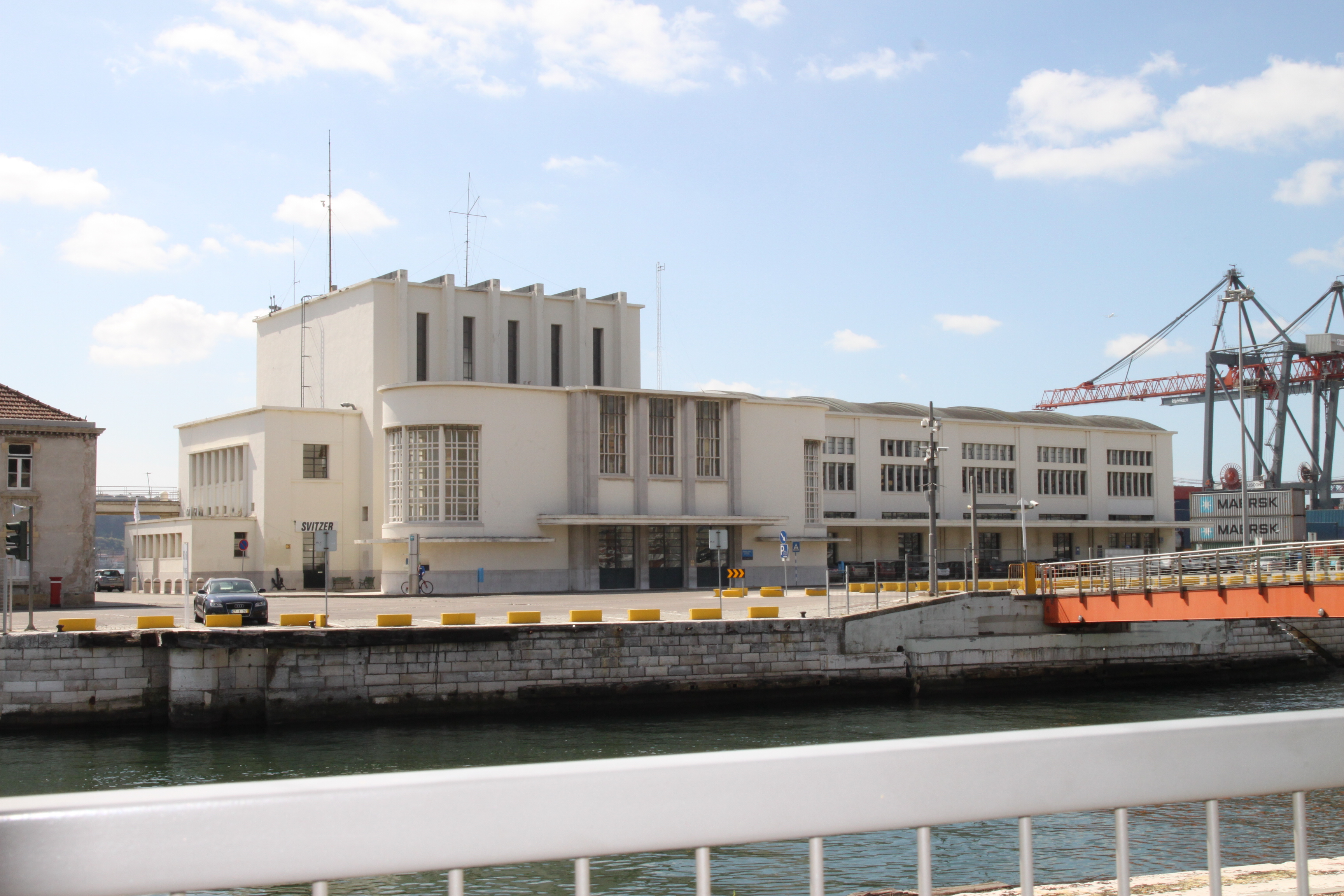 Gare Marítima da Rocha do Conde de Óbidos; Arq. Pardal Monteiro This file was uploaded for Wiki Loves Monuments in Portugal with the unique identifier 330140.